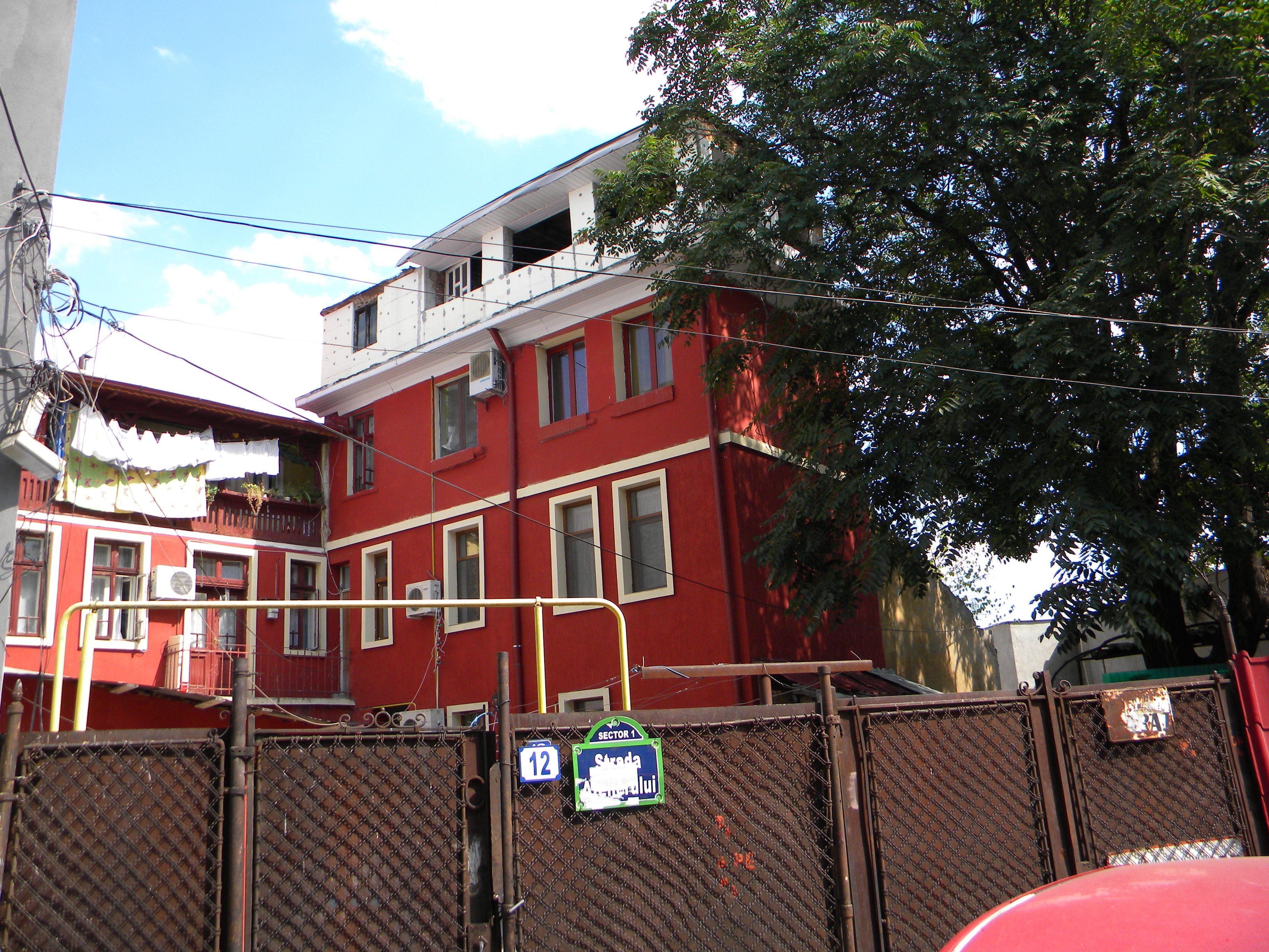 Bucuresti, Romania, Str. Atelierului nr. 12, sect. 1; B-II-m-B-18006